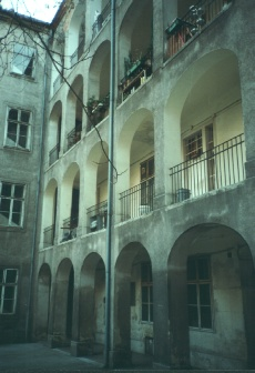 Schleifmühlgasse 20, Arkaden